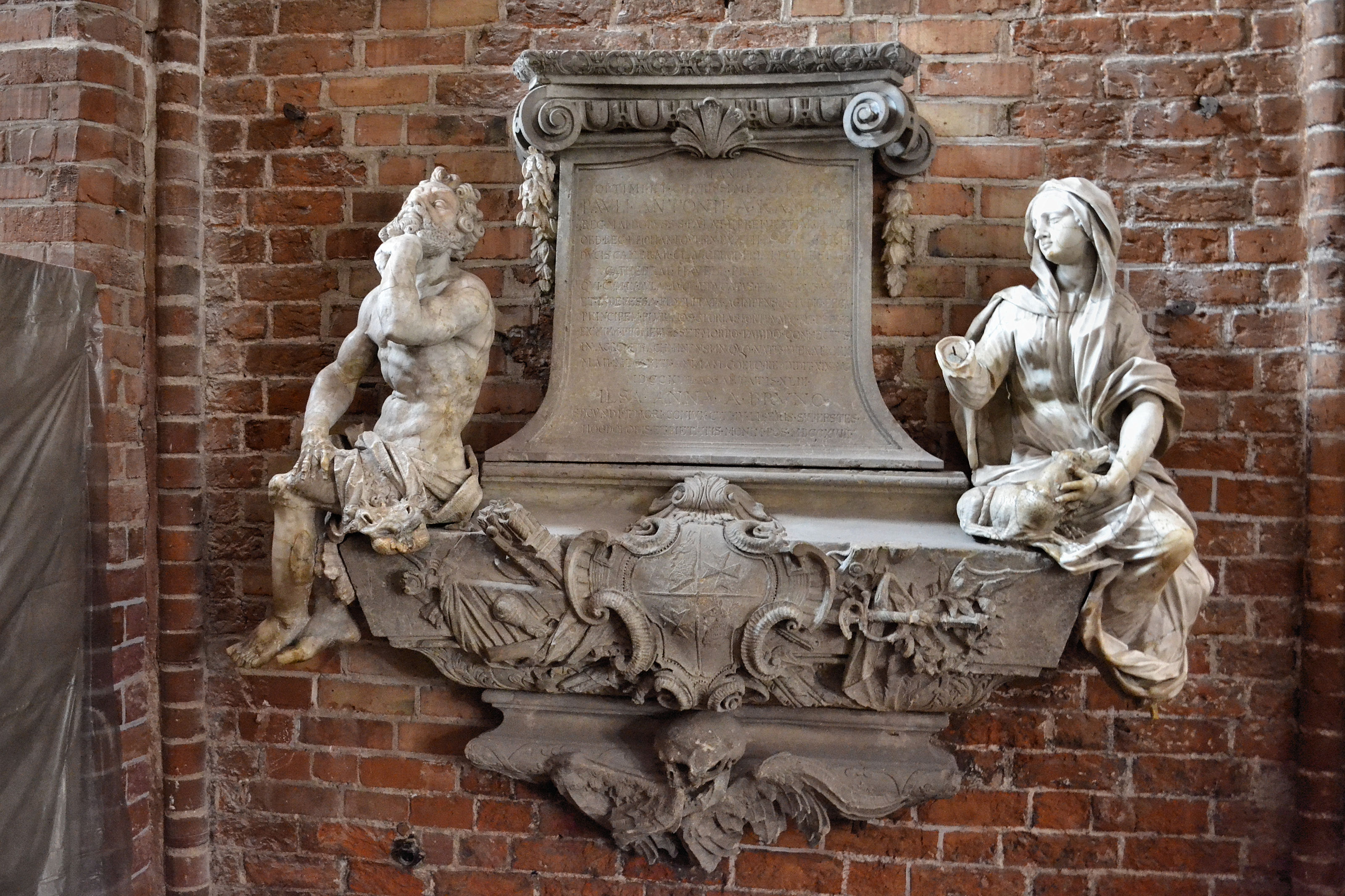 Epitafium Antoniego Kameke w kołobrzeskiej katedrze